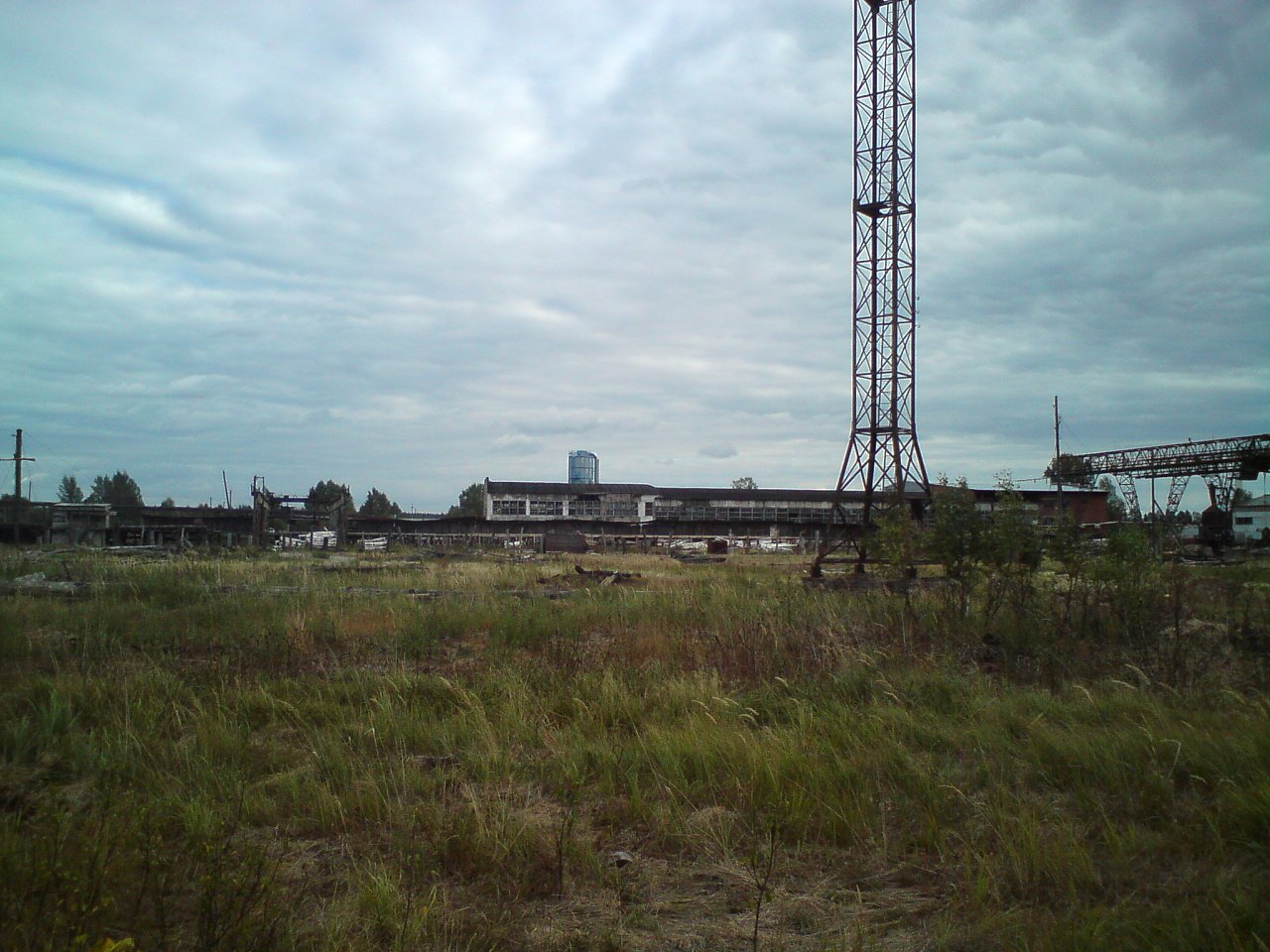 леспромхоз